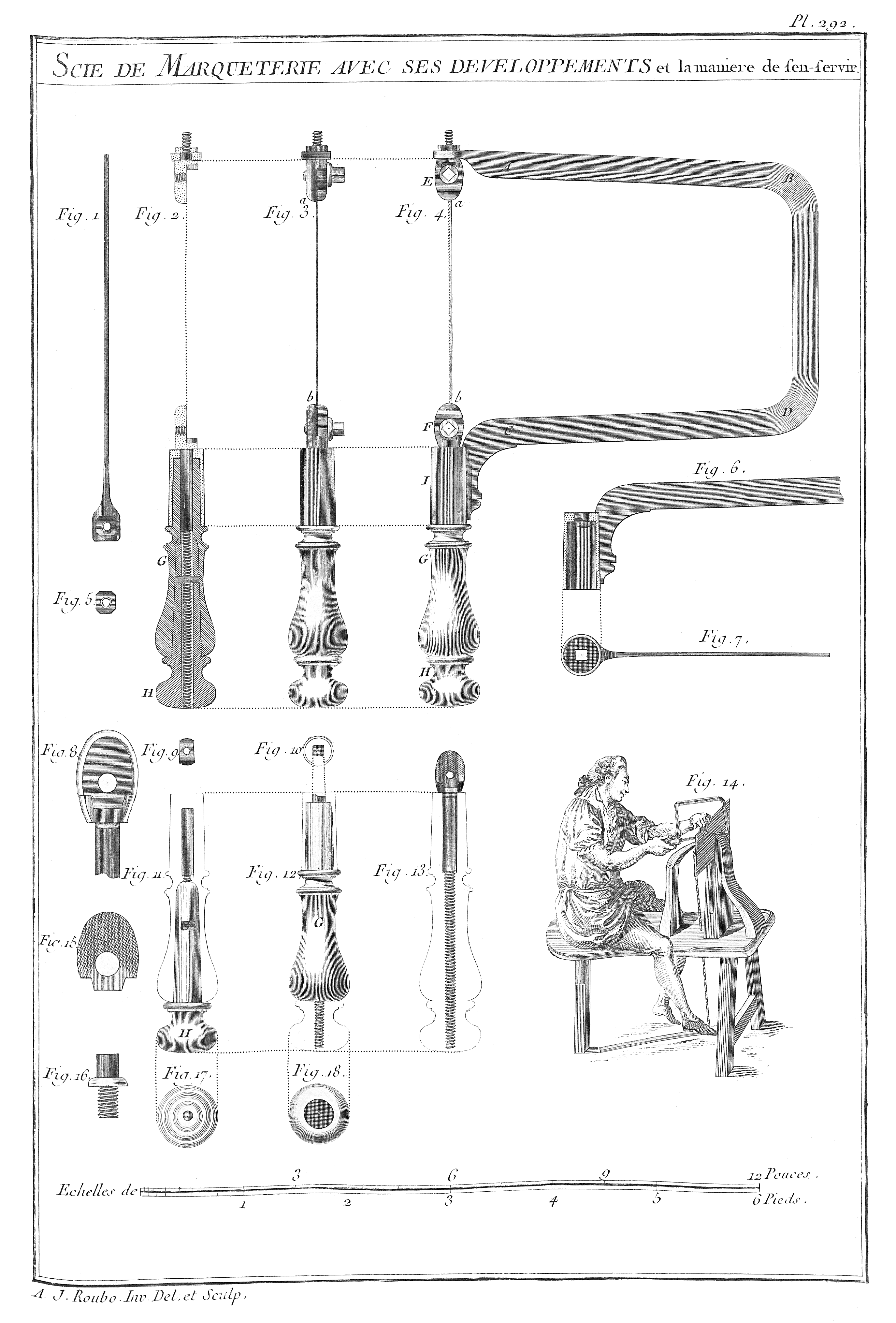 Scie de Marqueterie avec ses developpements et la maniere de ſen-ſervir.